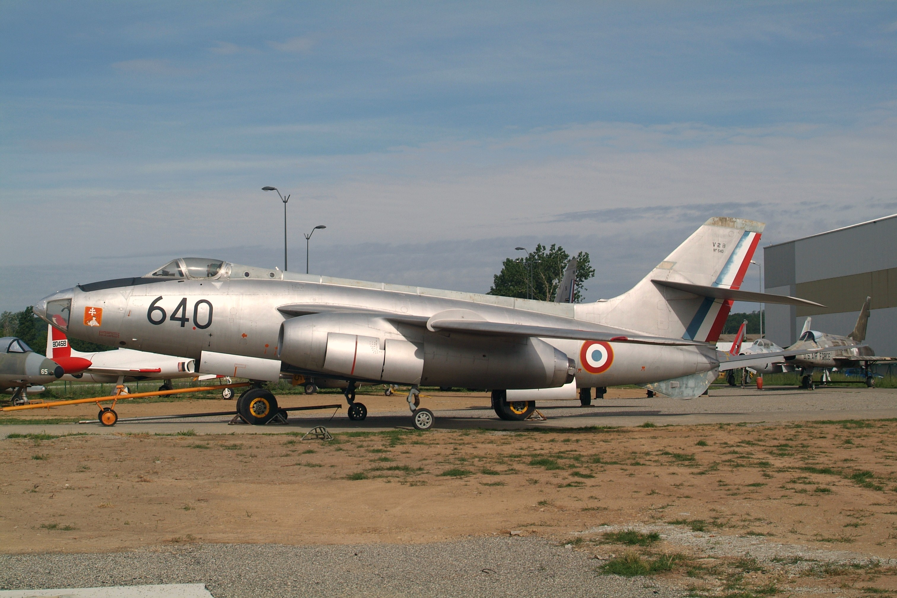 640 Sud-Est 4050 Vautour IIB French Air Force